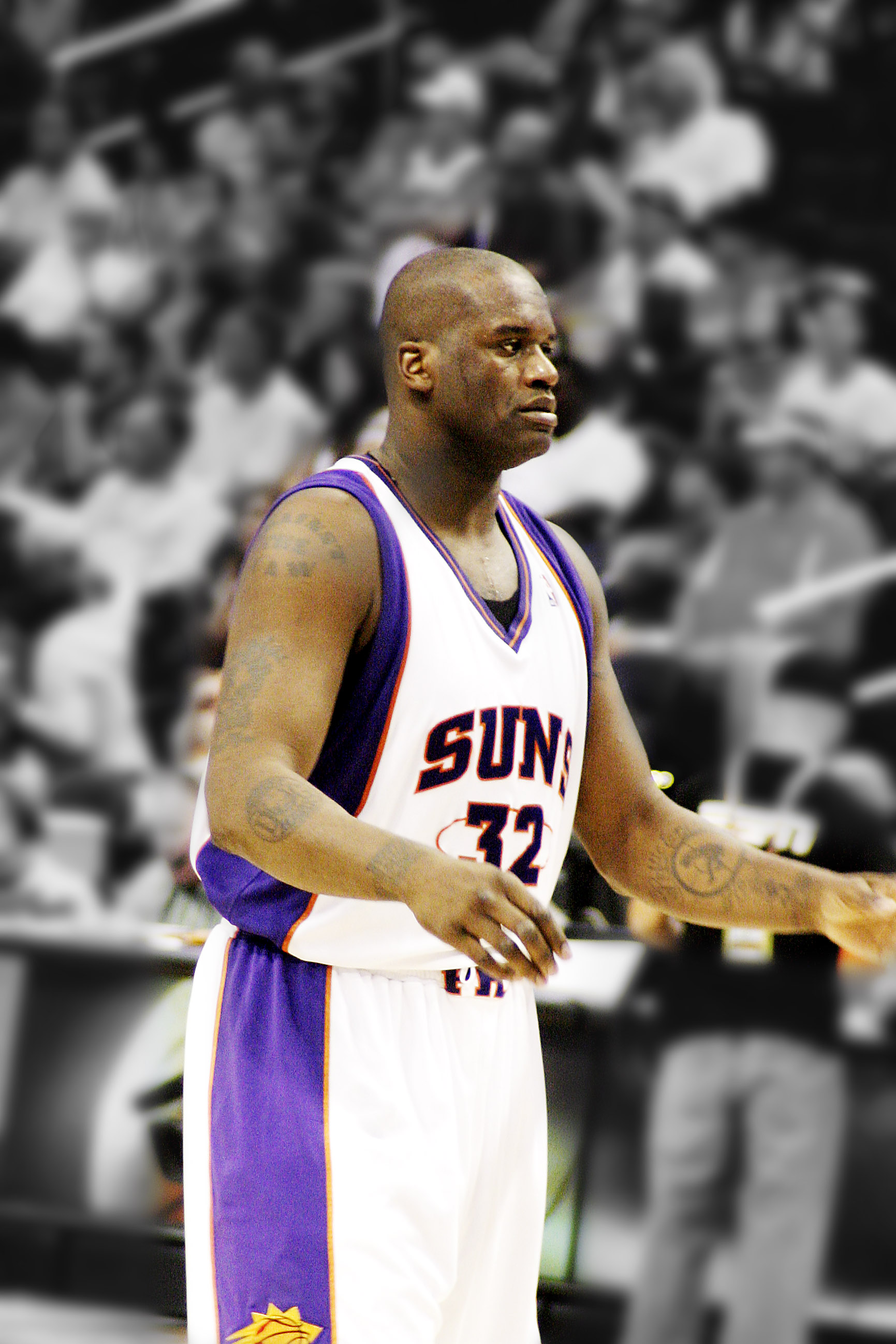 Shaquille O'Neal